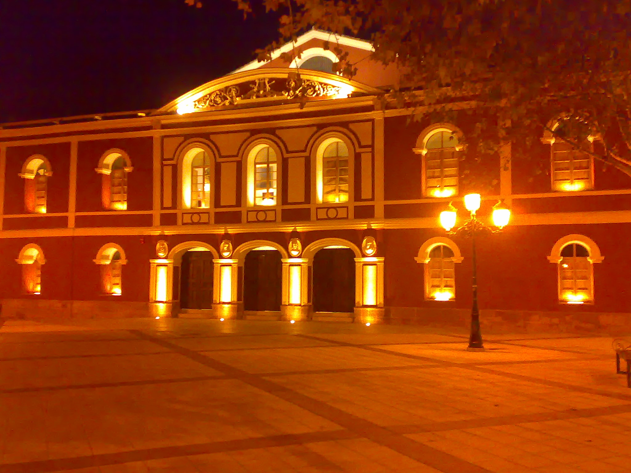 Fachada principal del Teatro Guerra de Lorca.